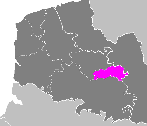 Arrondissement_de Lens